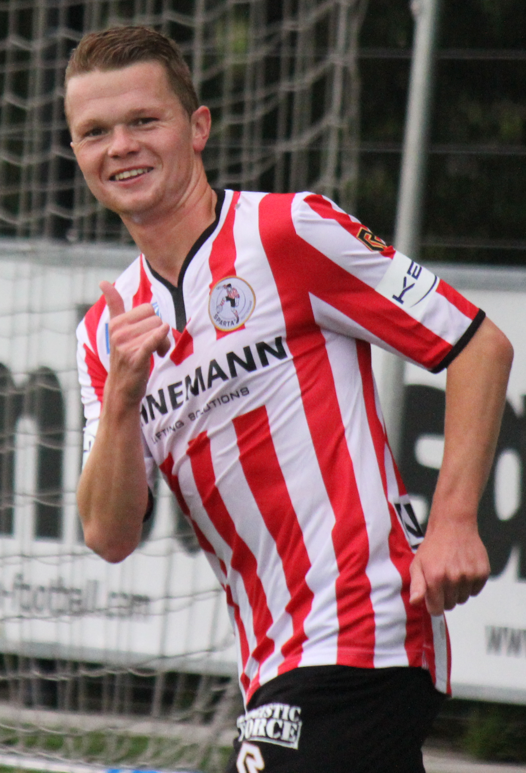 Langedijk scoorde de 0-3 in vriendschappelijke wedstrijd.